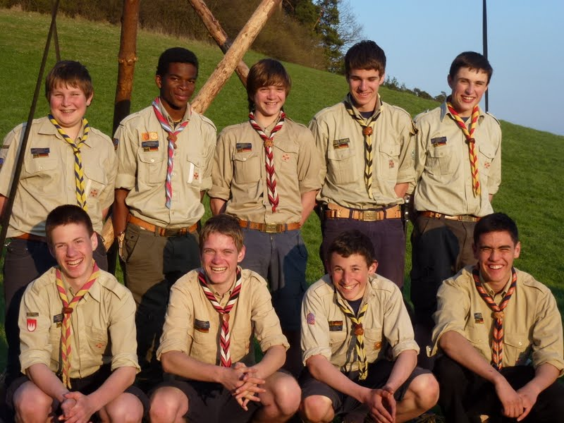 Projekt "Tensegrity" (Turmbau)